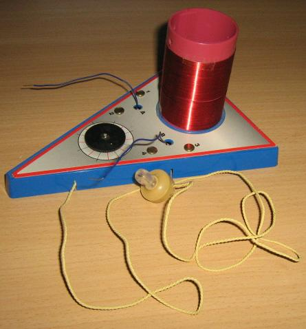 Poste a diode (OA85) pour l'écoute de la bande 520 kHz à 1620 kHz.